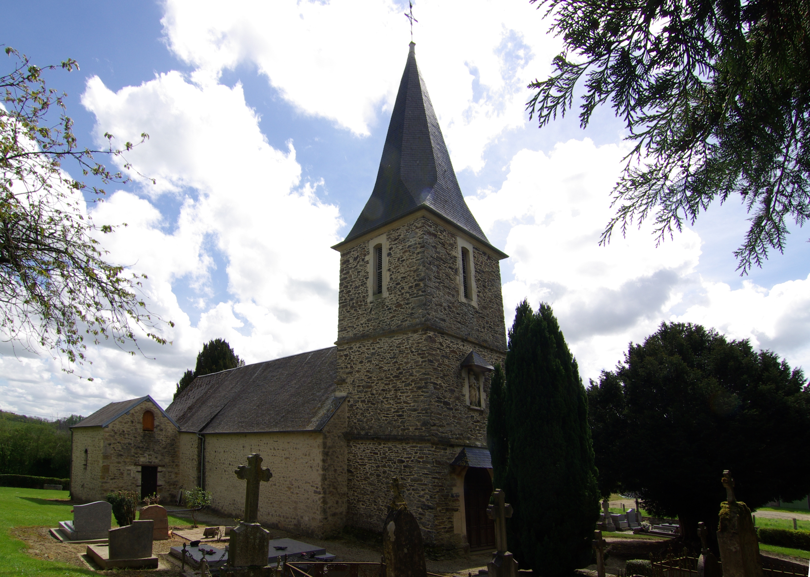 L'église de La Pommeraye, Calvados.